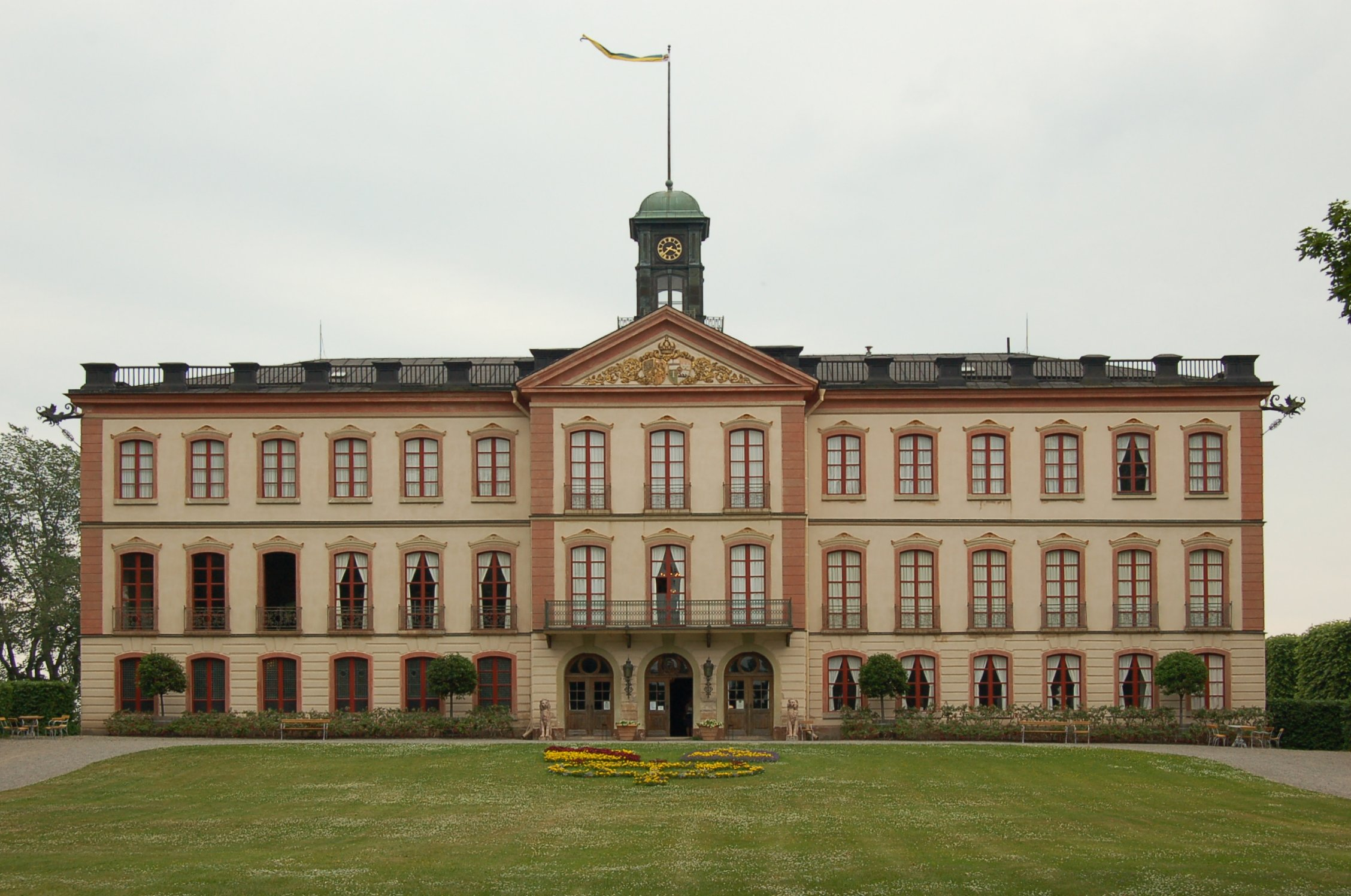 Tullgarns slott från landsidan